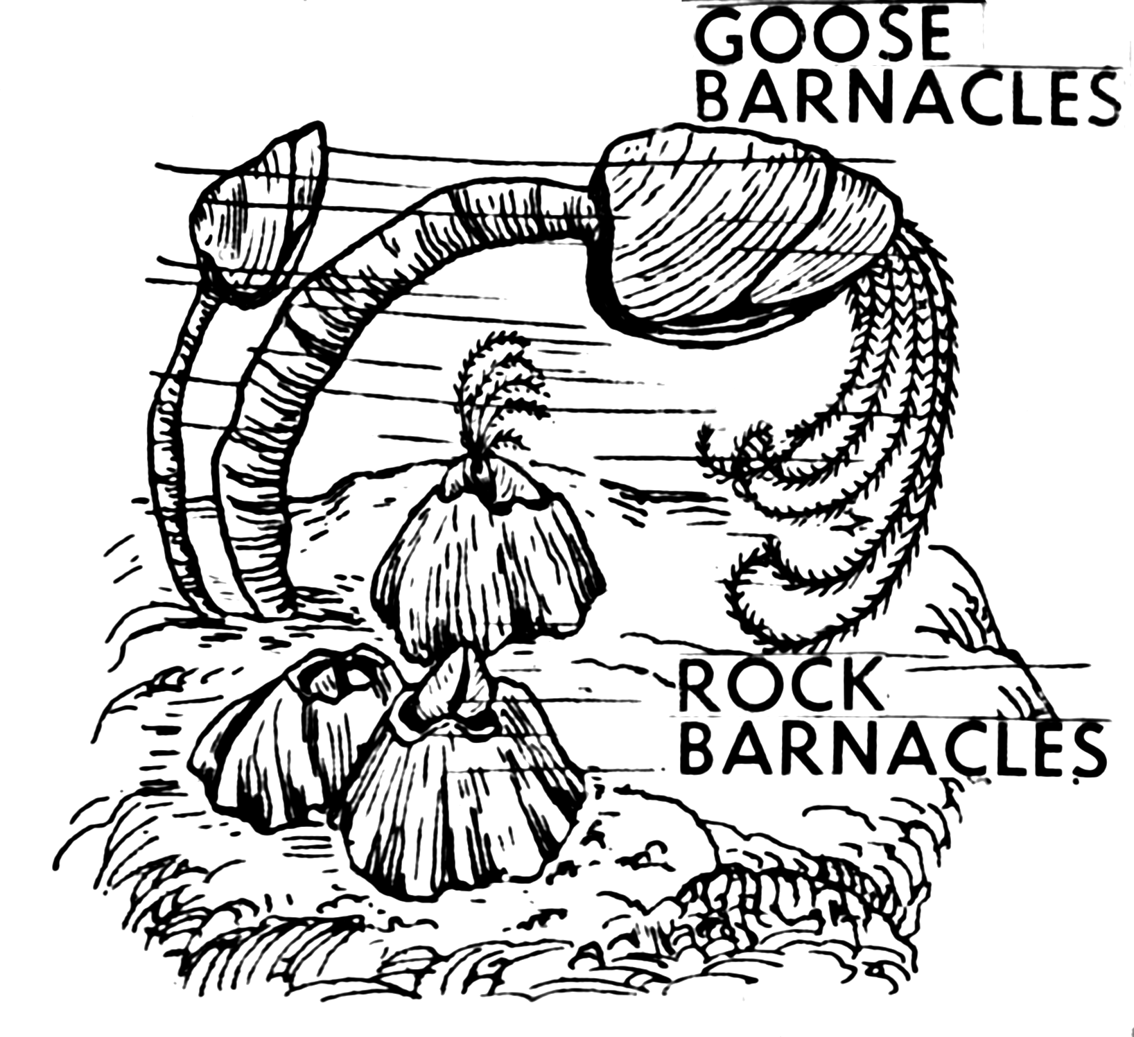 Barnacles